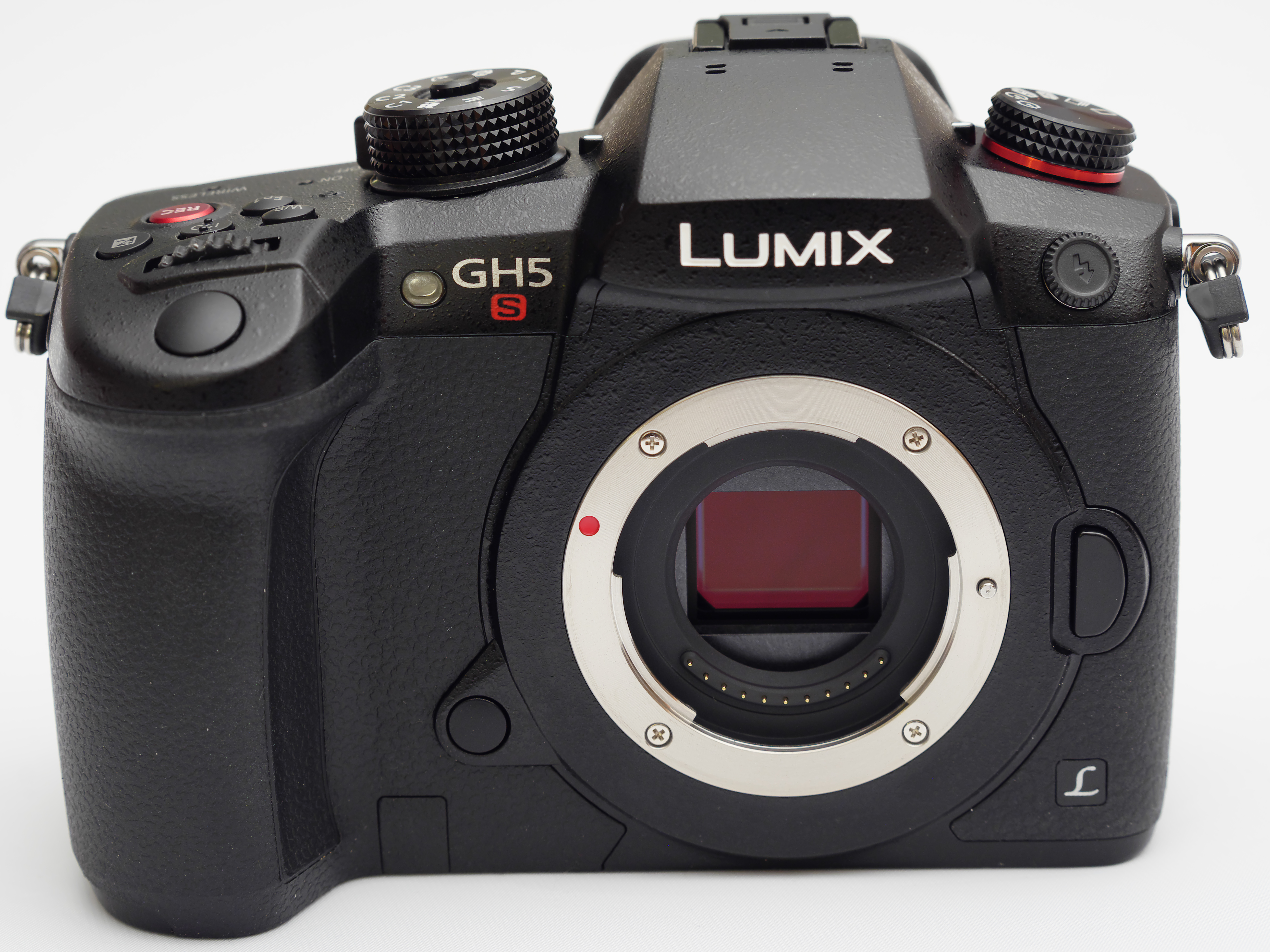 Panasonic Lumix DC-GH5S von schräg oben.